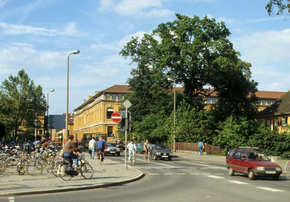 Tübingen, Geowissenschaftliche Institute (Geologie und alte Geographie) in der Hölderlinstraße.